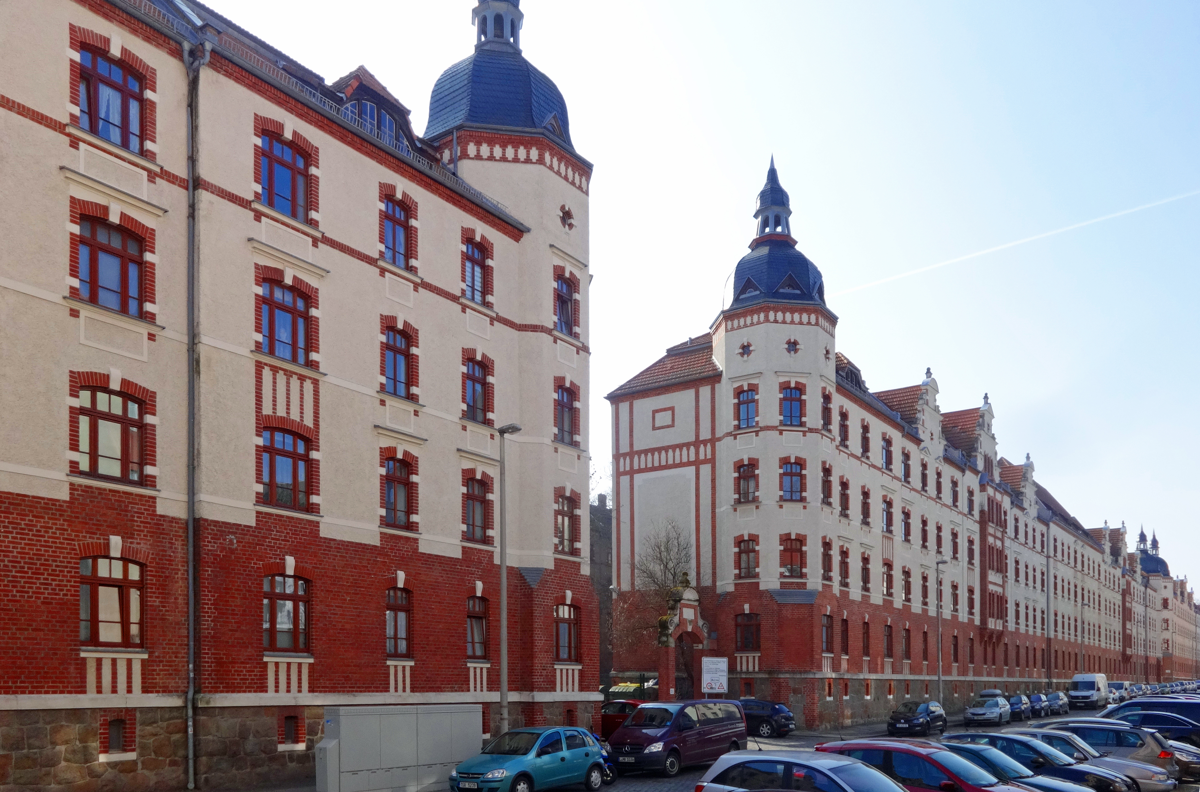 Leipzig-Reudnitz, Hofer Straße, Meyersche Häuser